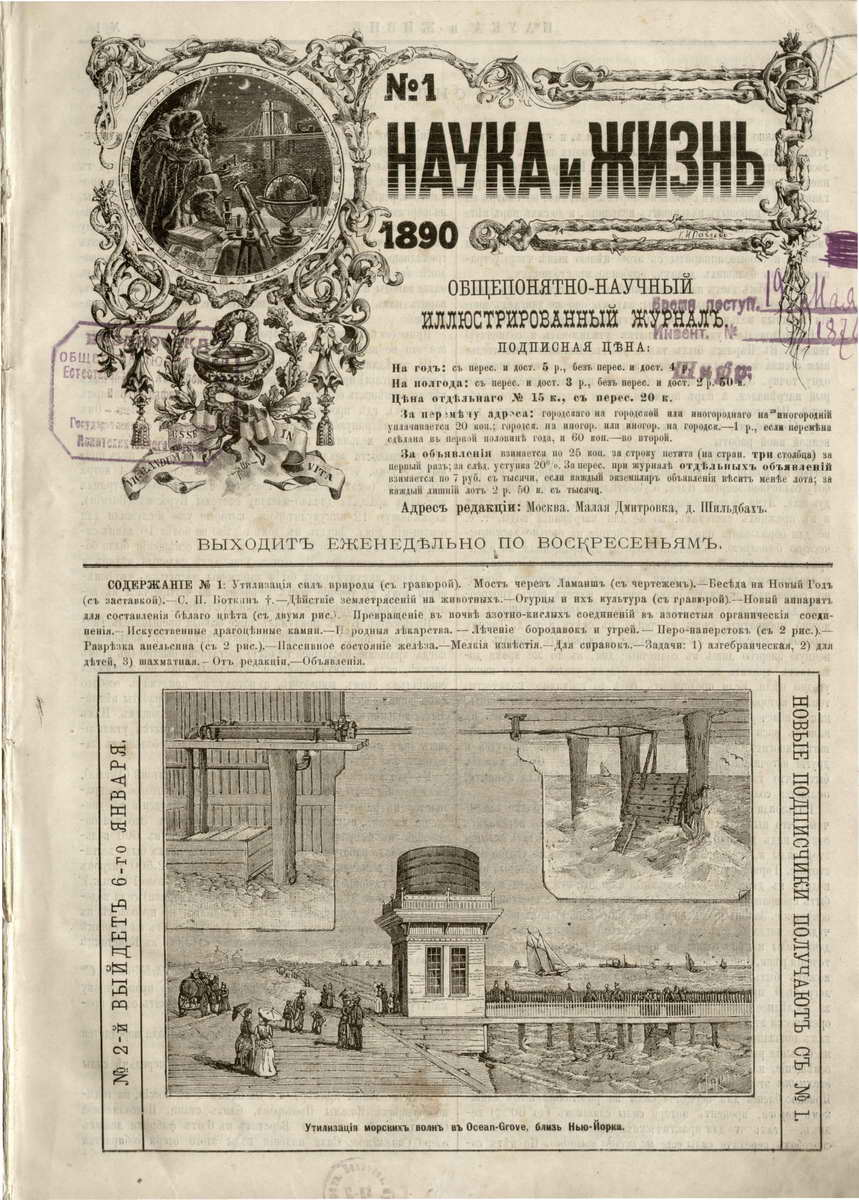 Обложка первого номера журнала Наука и жизнь за 1890 год